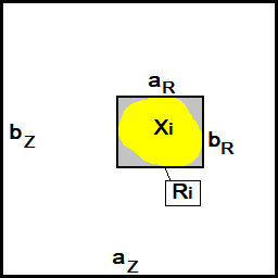 Particule individuelle et rectangle circonscrit associé